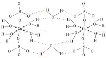 五水硫酸铜结构